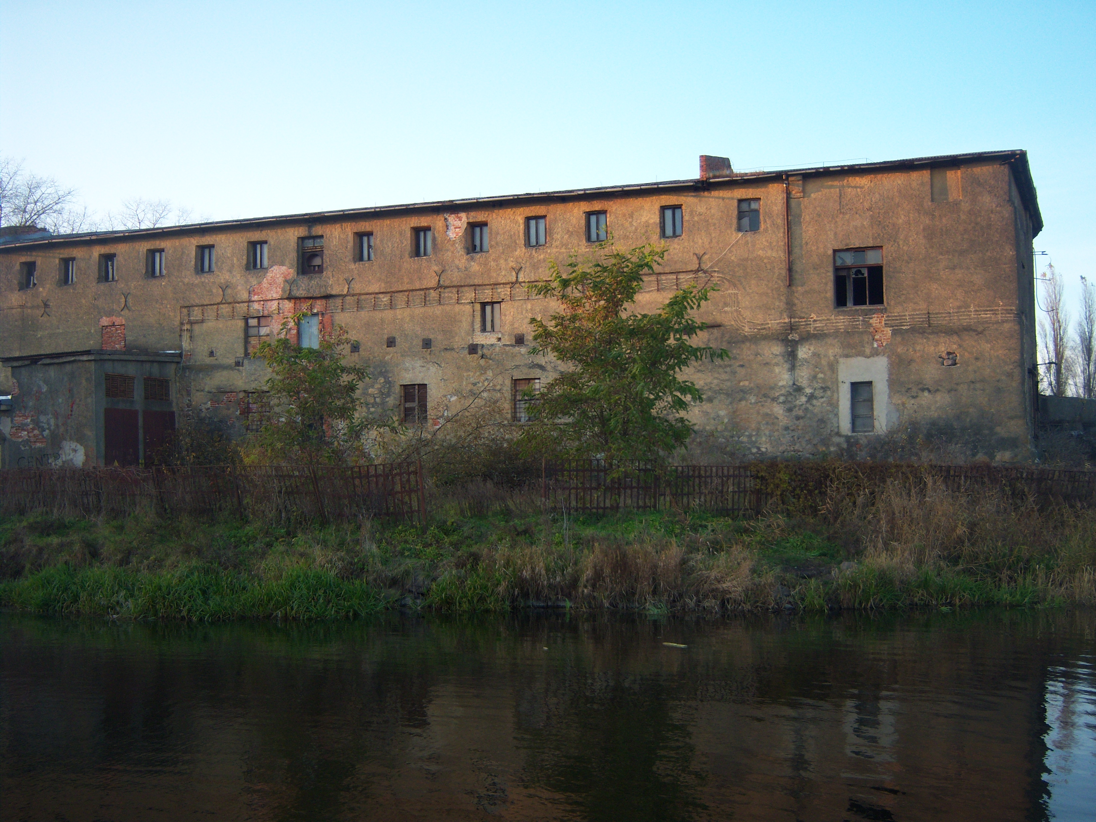 Замок снят с другого берега реки